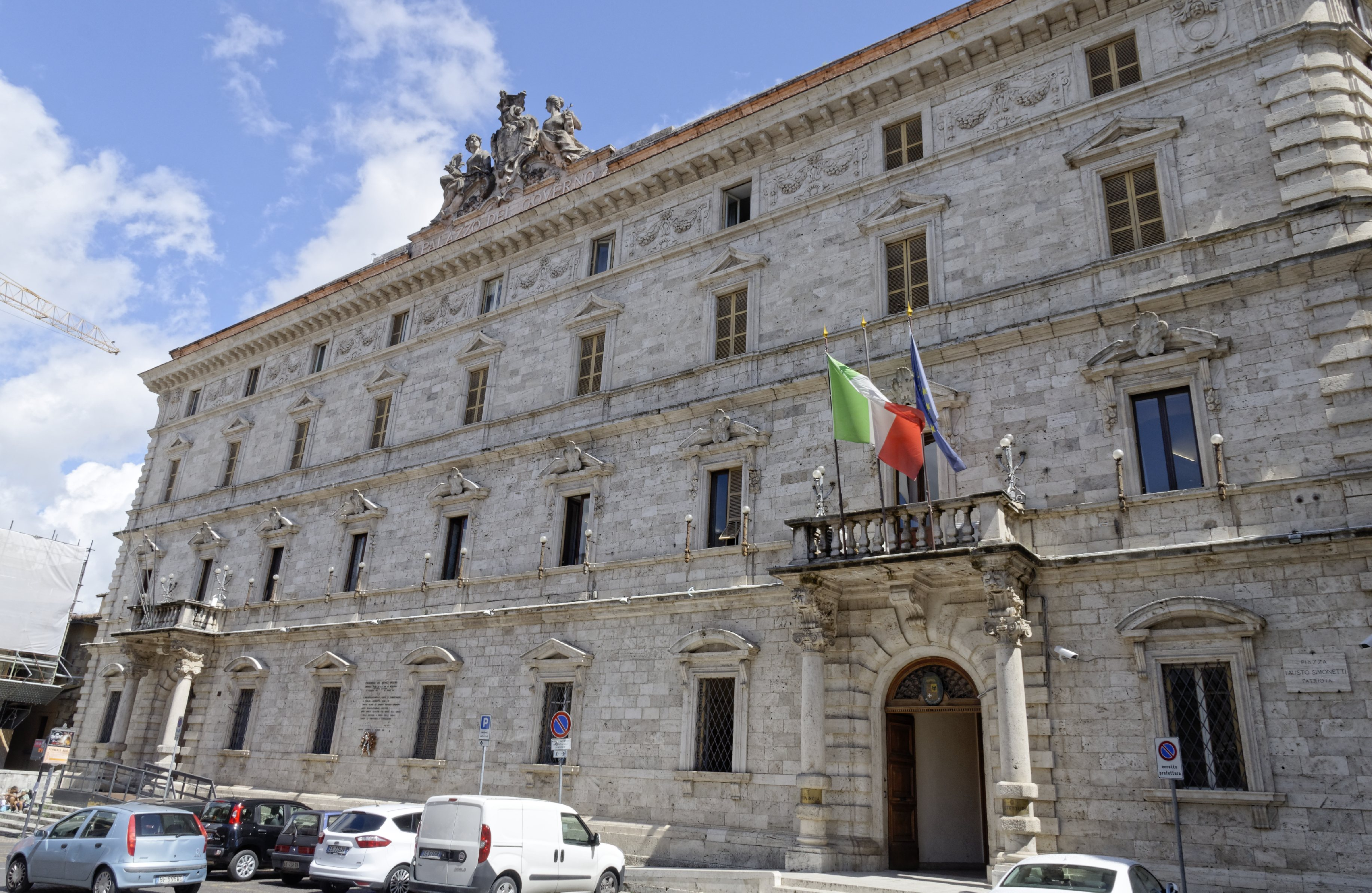 Ascoli Piceno 2015 Dieses Foto entstand in Zusammenarbeit mit Stadtbesichtigungen.de Die Seiten Stadtbesichtigungen.de, der dazugehörige Reise Blog sowie die Facebookseite: Stadtbesichtigungen Rom dürfen dieses Bild für Ihre Veröffentlichungen ohne den Hinweis auf Wikipedia, Commons bzw der Lizenz verwenden. Die Verantwortlichen habe von mir (Ra Boe) die Originaldaten zur freien Verfügung übermittelt bekommen.